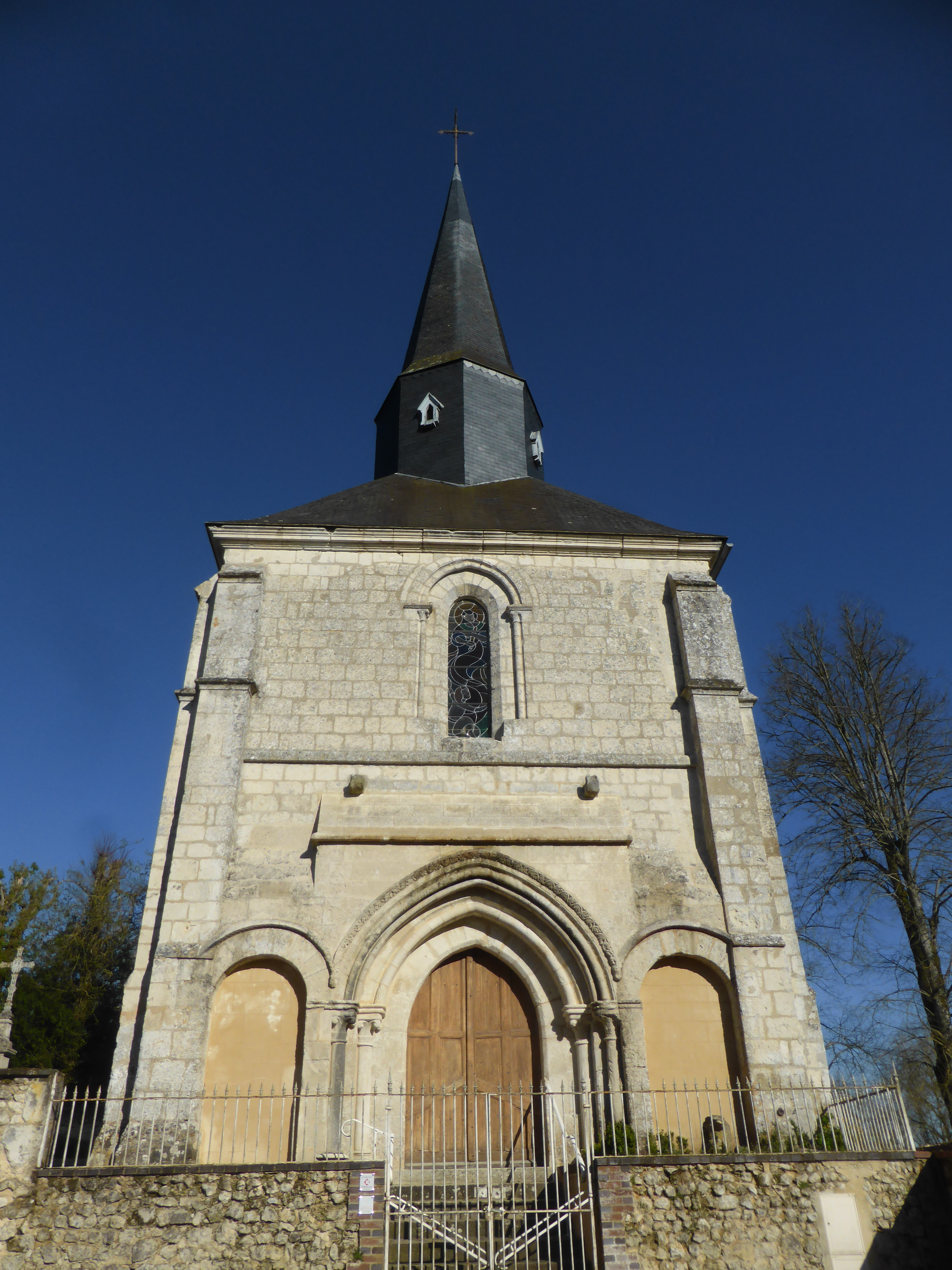 Façade et clocher de l'église Saint-Martin de Corbon, dans l'Orne.